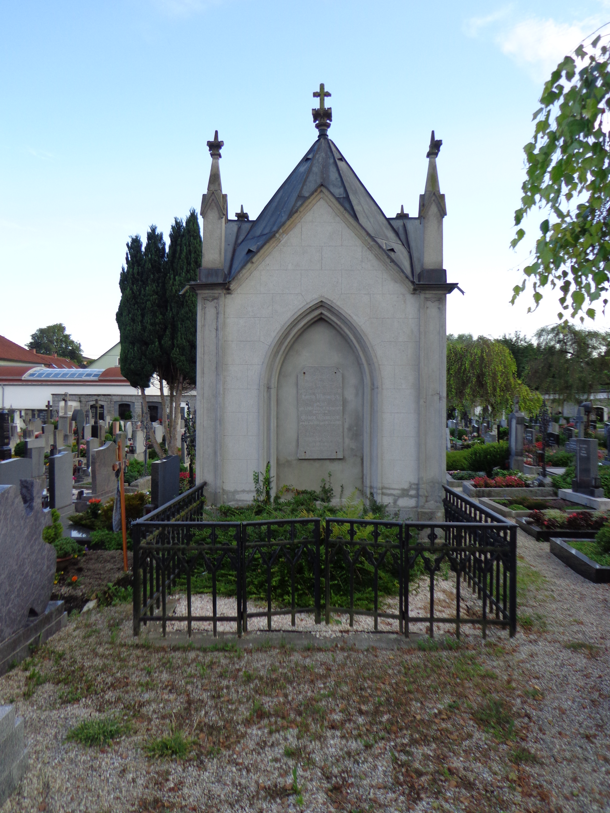 Stadtfriedhof Schärding - Wieninger-Kapelle